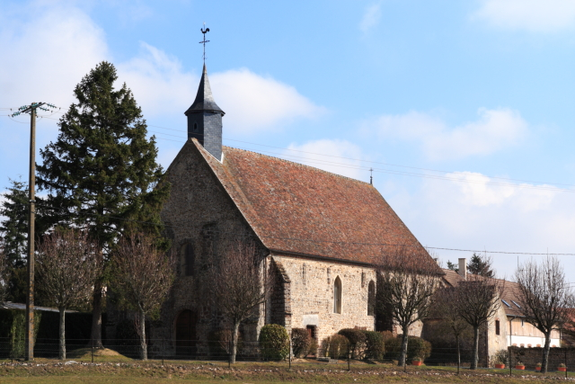 Eglise de Favières ( Eure et Loir, France)